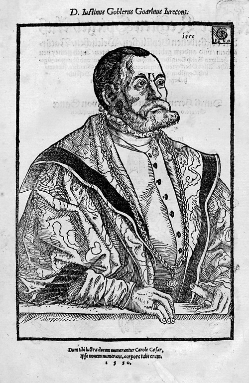 Illustration aus: Justin Göbler: Der Rechten Spiegel, auß den beschribenen Geystlichen, Weltlichen, Natürlichem, und andern gebreuchlichen Rechten ... zugericht. Frankfurt, Christian Egenolff, 1550.